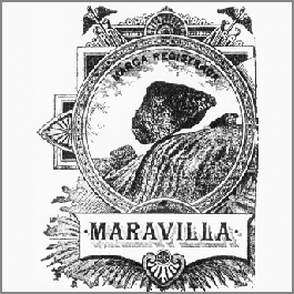 Escudo de Ramón Santamarina